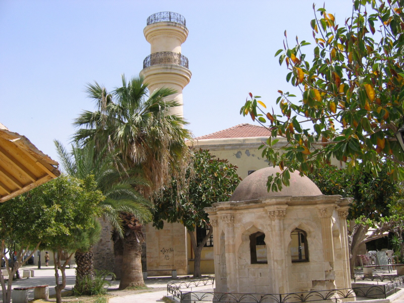 Ehemalige Türkische Moschee, Ierapetra, Kreta, Griechenland